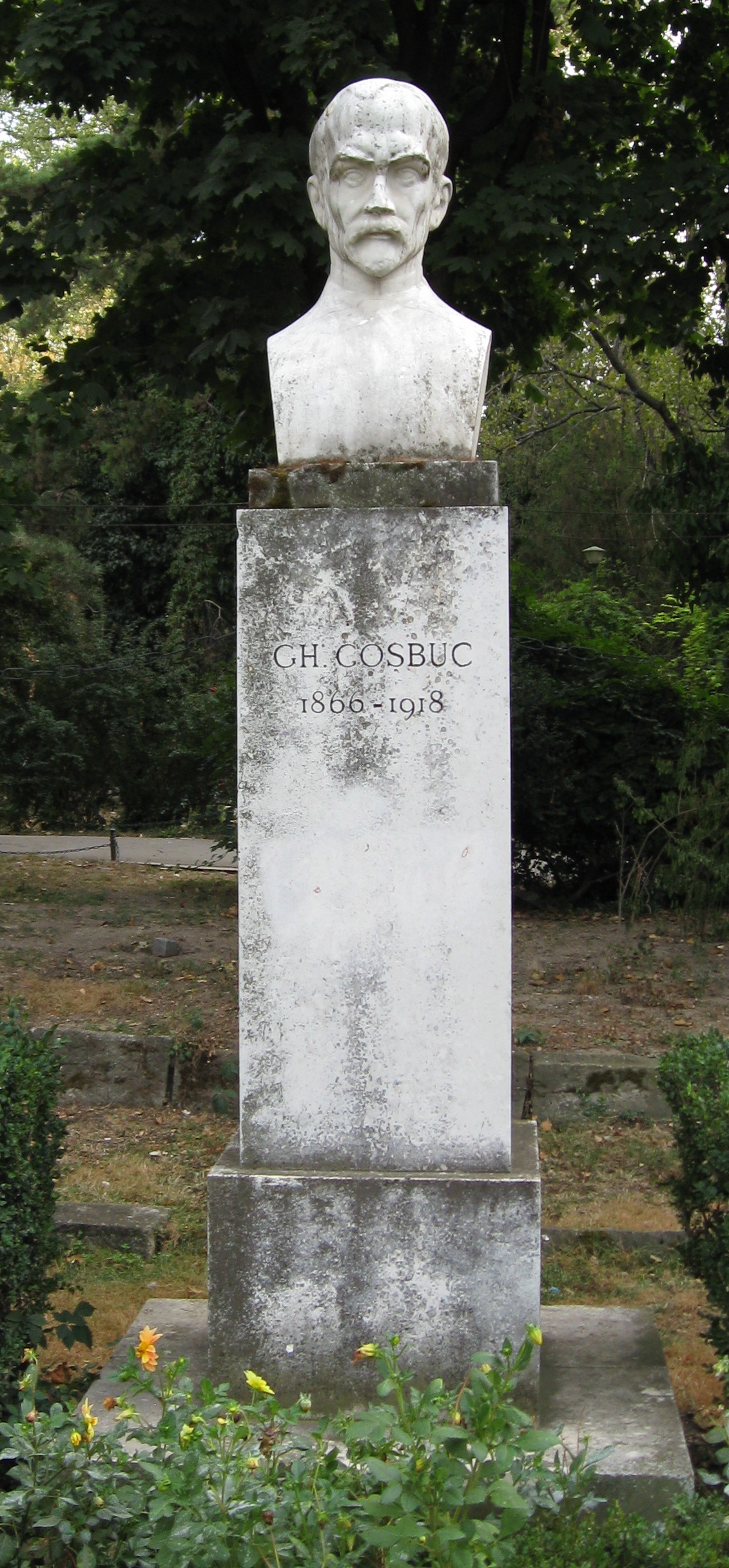 Gheorghe Coşbuc sculpture in Cişmigiu, Bucharest, Romania